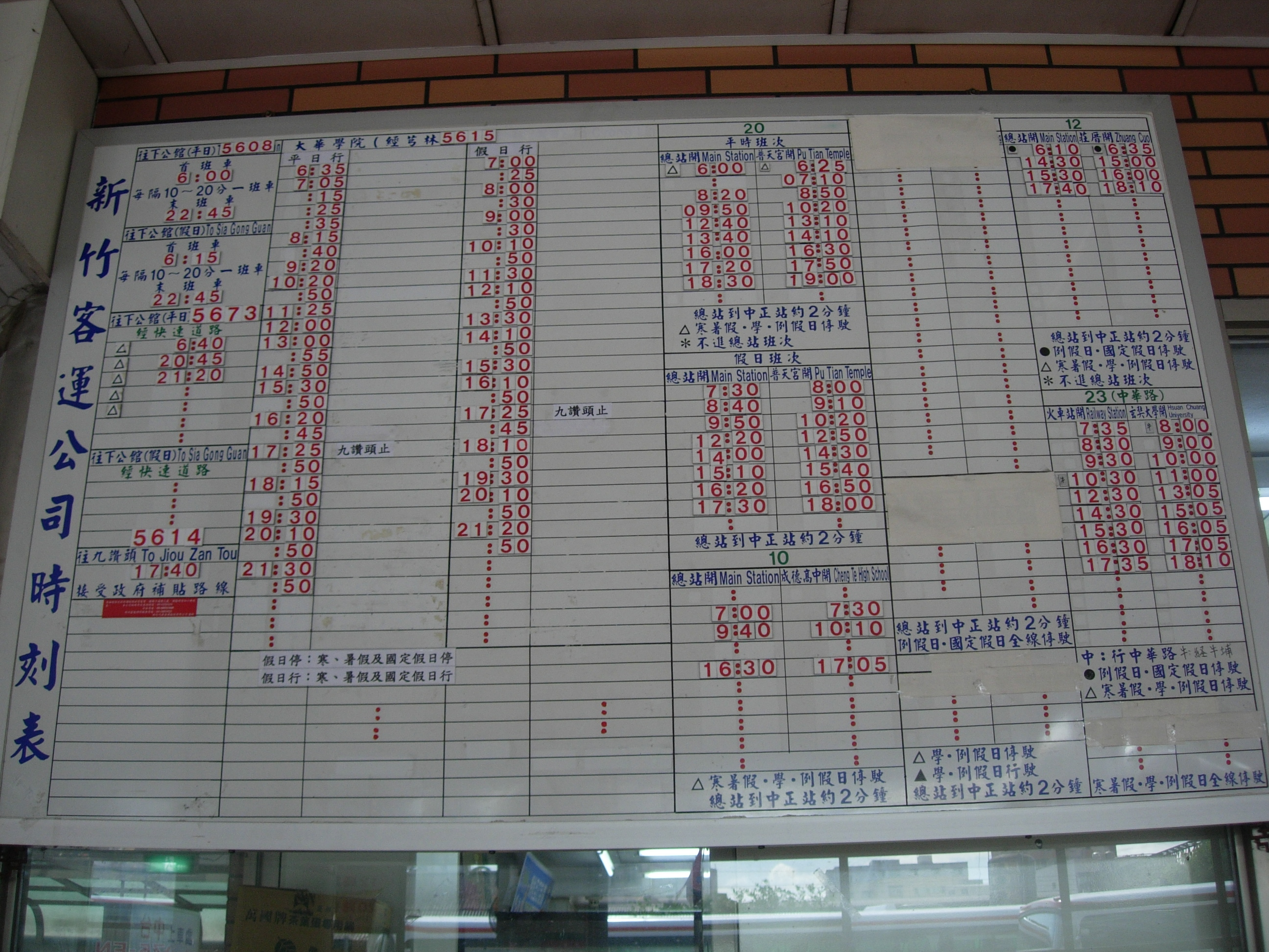 中文（台灣）: 新竹客運新竹總站時刻表